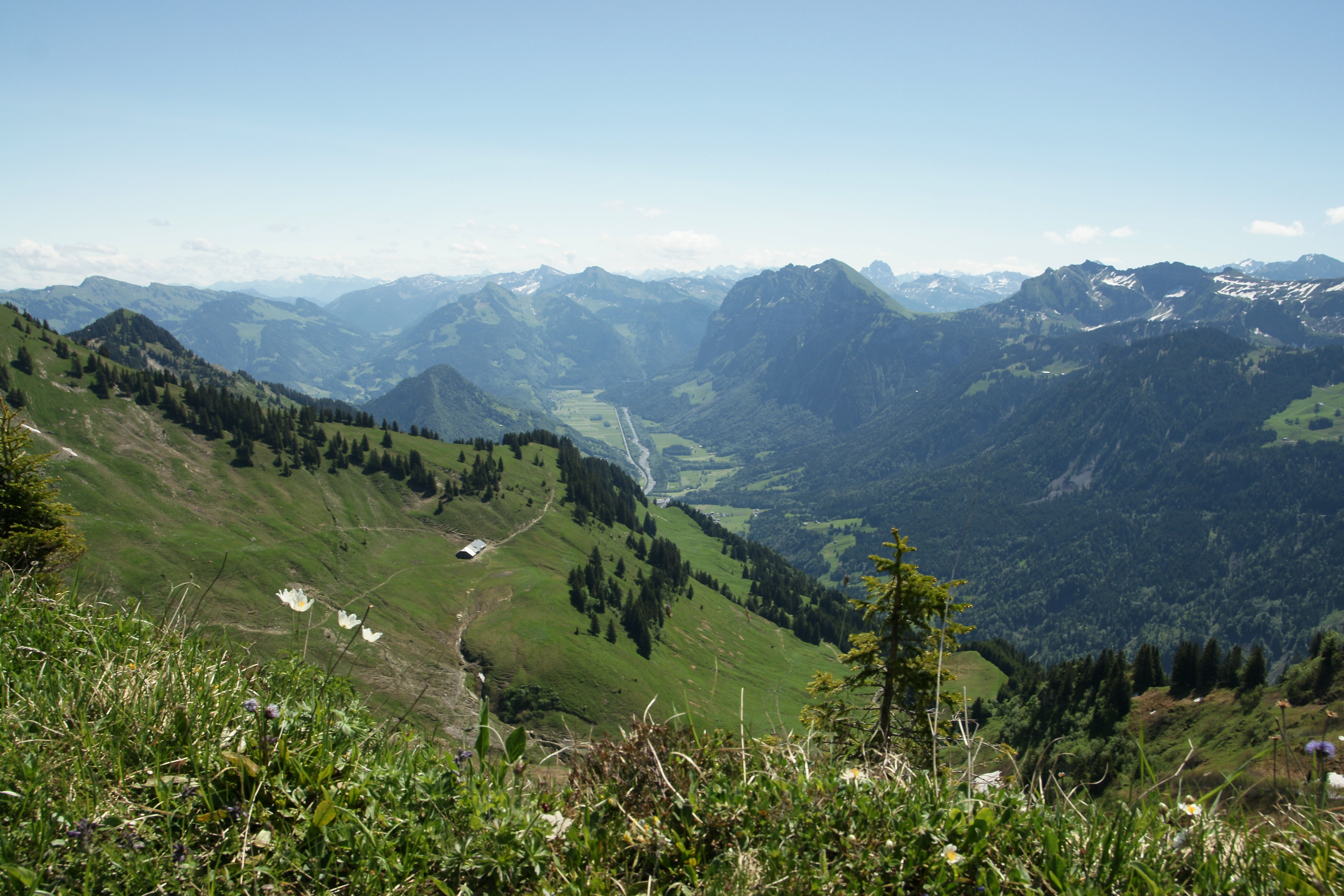 Auf dem Dornbirner First richtet sich der Blick in den hinteren Bregenzerwald. Im Tal die Bregenzer Ache und die Ortschaft Mellau. Links das Hangköpfle und die Hangspitze. Im Vordergrund die Obergüntenstallalpe. Ausser der Mitte rechts die Nordflanke der Kanisfluh. Die weiße Blume am Boden heißt Alpen-Kuhschelle.